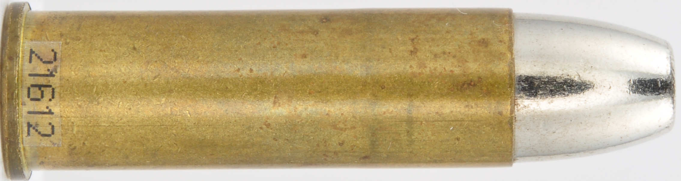 8 mm naboj za revolver Rast & Gasser.